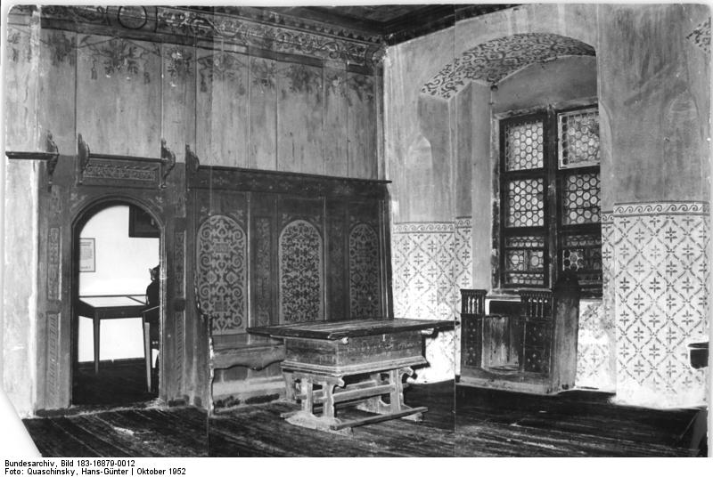 Wittenberg, Lutherhaus, Wohnzimmer Zentralbild Quasch. 20.10.1952 Zur 450- Jahrfeier der Martin- Luther-Universität Halle- Wittenberg vom 18. bis 25.10.52 Während der Festwoche haben die auswärtigen Gäste die Gelegenheit, die historischen Stätten der alten Lutherstadt Wittenberg zu besichtigen. In dem Luther- Haus in Wittenberg sind alte Schriften und Gegenstände, die in Luthers Leben eine Rolle spielten, ausgestellt. - Blick in ein vollständig im Original erhaltenes Wohnzimmer Luthers. [3-teiliges Panorama]